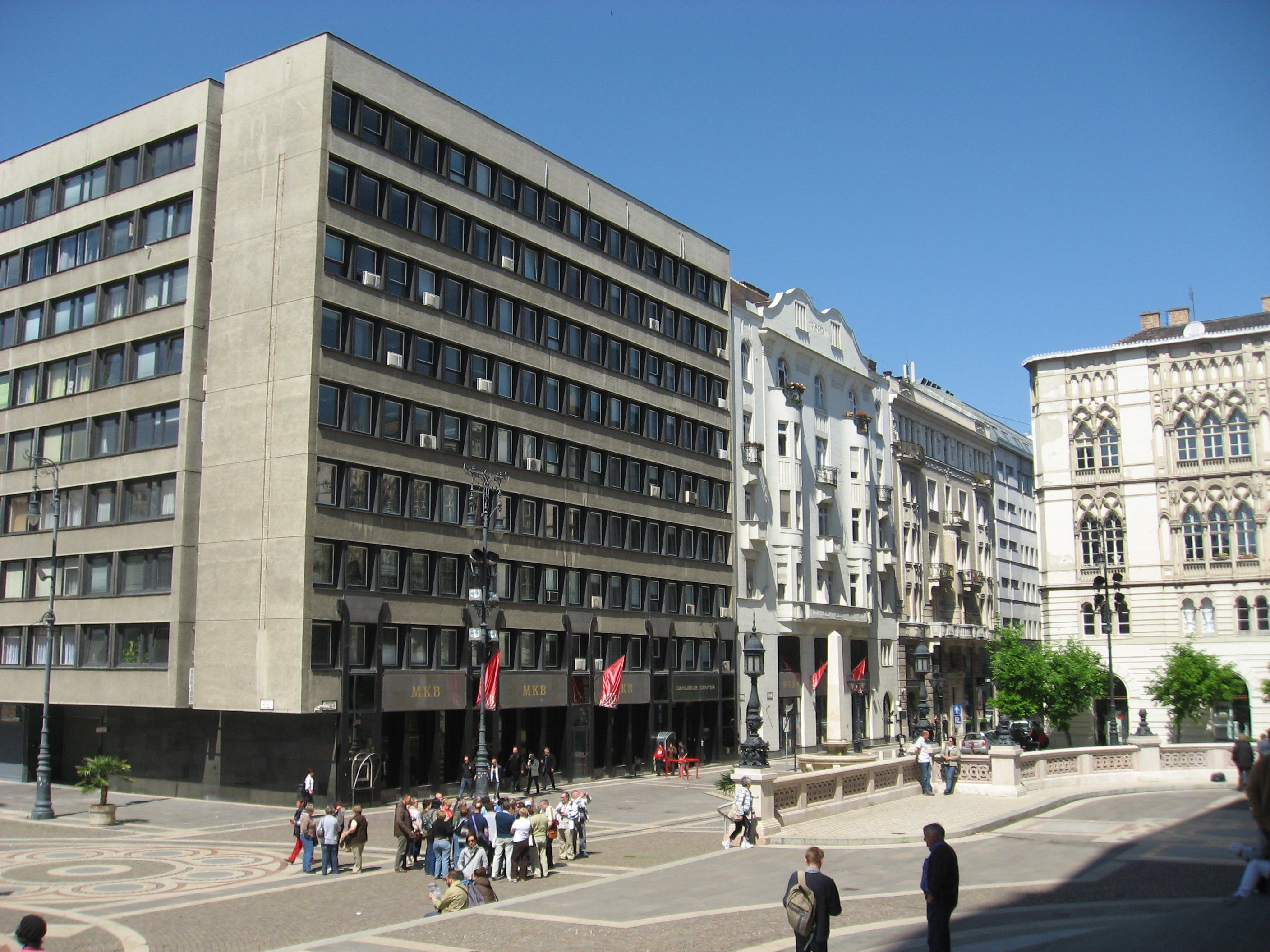 Budapešť